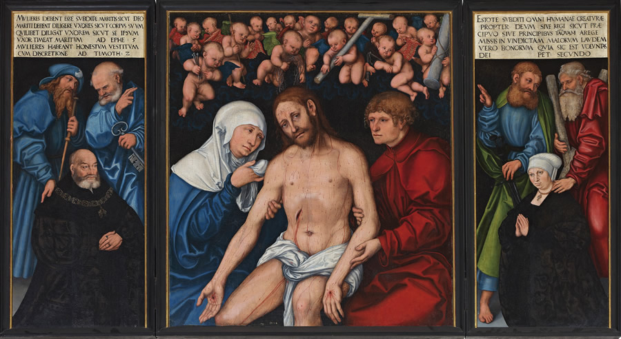 Lucas Cranach d. Ä., Altartriptychon in der Grabkapelle Georgs des Bärtigen, Meißner Dom. Im Mittelbild Christus nach der Kreuzabnahme, wie lebend dargestellt, mit Maria und Johannes; darüber Putten mit den Leidenswerkzeugen; links Herzog Georg mit den Aposteln Jakobus und Petrus, rechts seine Frau Barbara mit den Aposteln Paulus und Andreas. Petrus deutet von links auf das rechts oben geschriebene Bibelwort (1 Petr:13-15), Paulus von rechts auf die Bibelworte links oben (Eph 5:22.28.33; 1 Tim. 2:9).